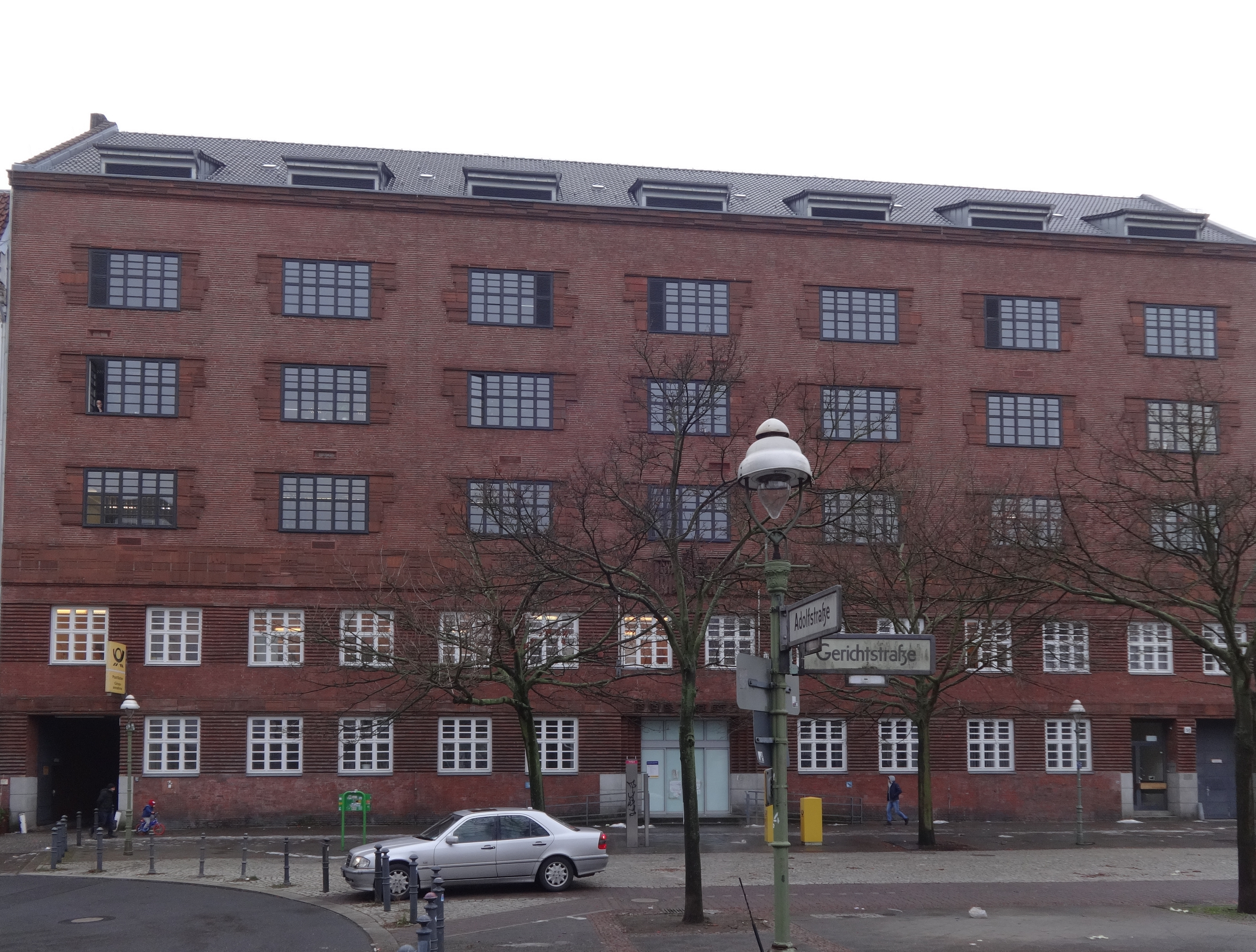 Berlin-Wedding im Winter